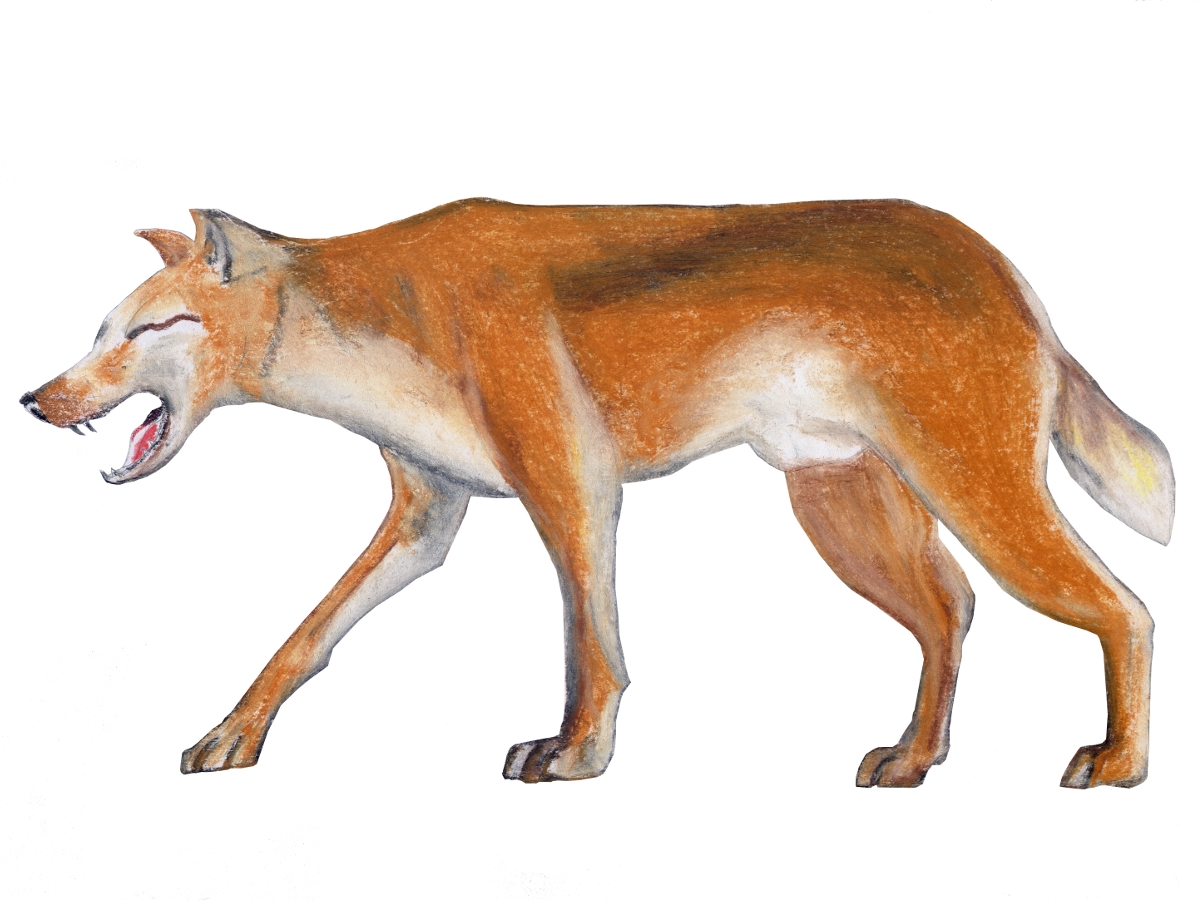 Un adjule, un canide africano la cui esistenza non è stata confermata